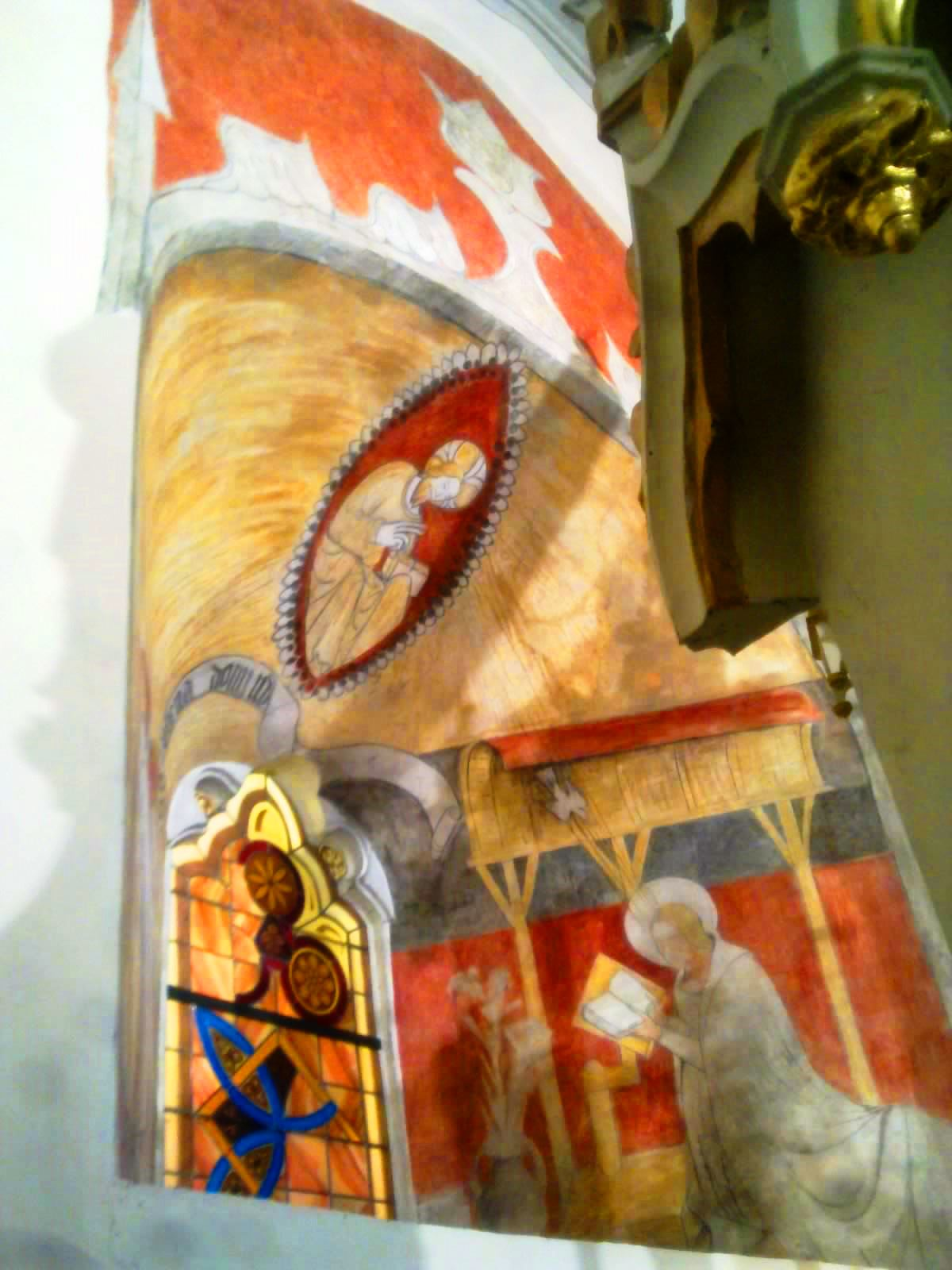 Fresque classée monument historique dans l'église d'Habère-Lullin (Haute-Savoie)